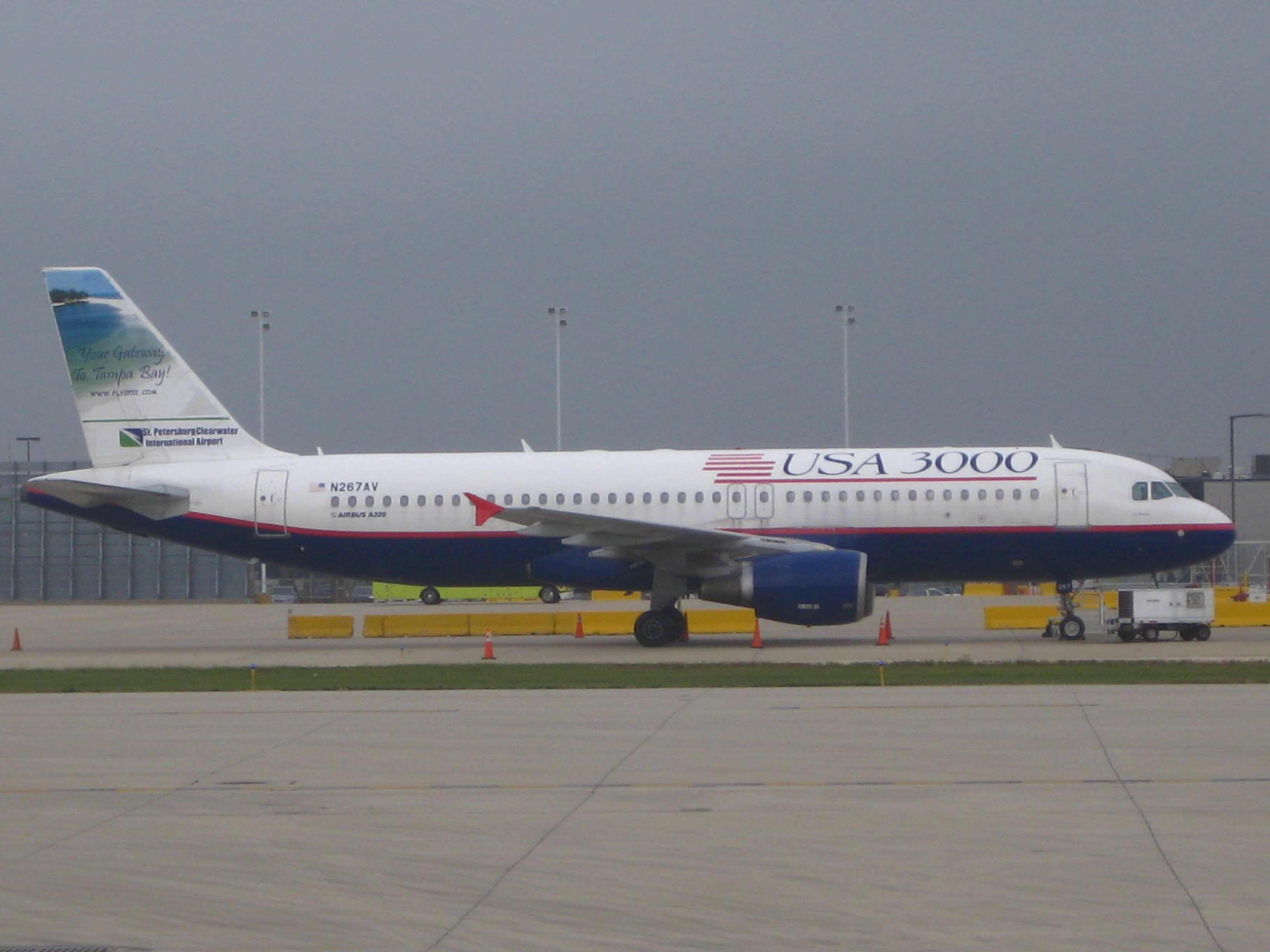 USA 3000 A320